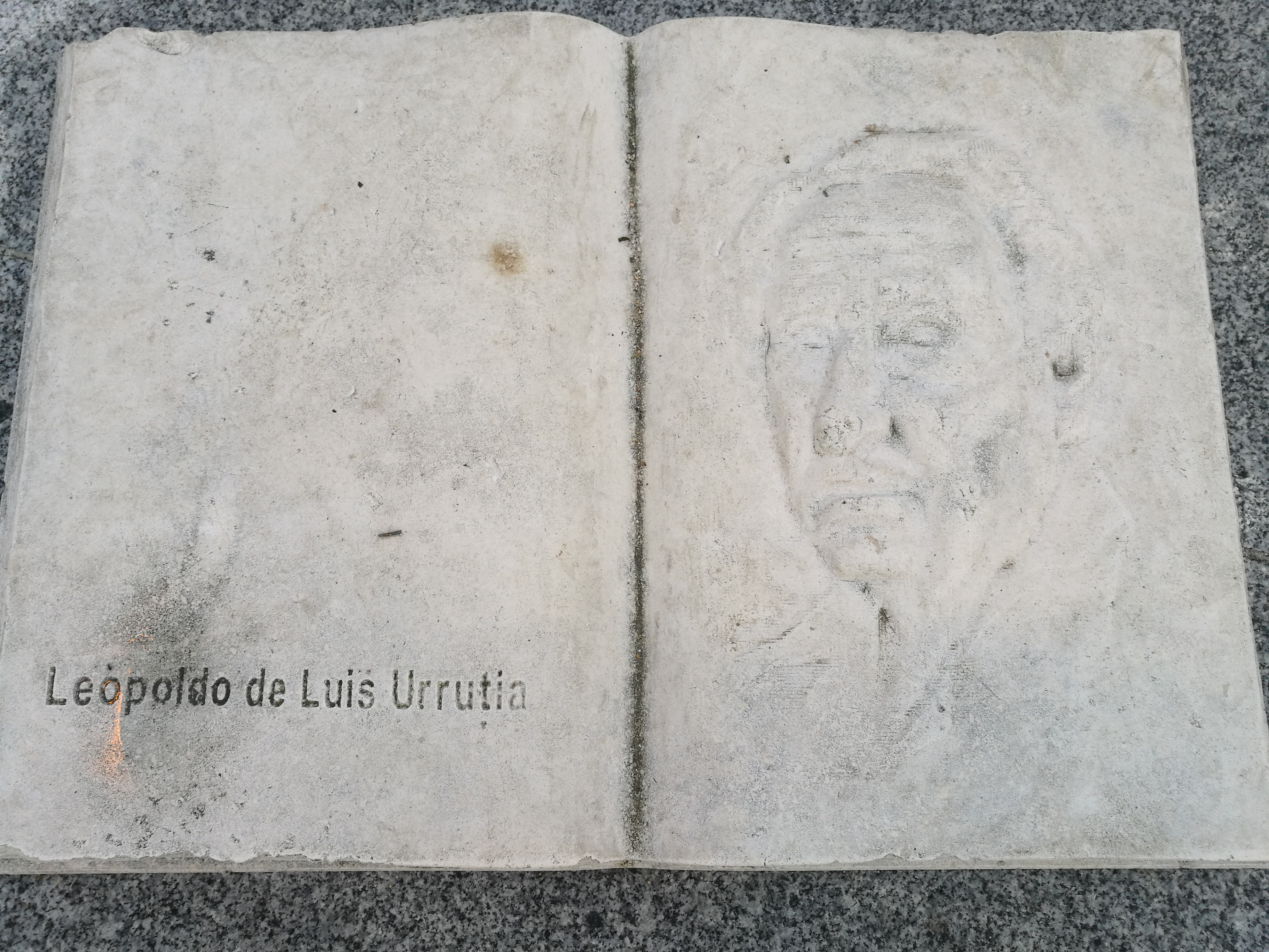 Relieve con el rostro de Leopoldo de Luis en su monumento, situado en el jardín de la Biblioteca Municipal Manuel Vázquez Montalbán, Madrid.